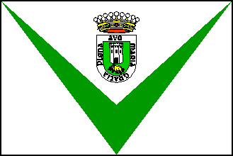 Bandera de Villalba/Vilalba, en Lugo (España)